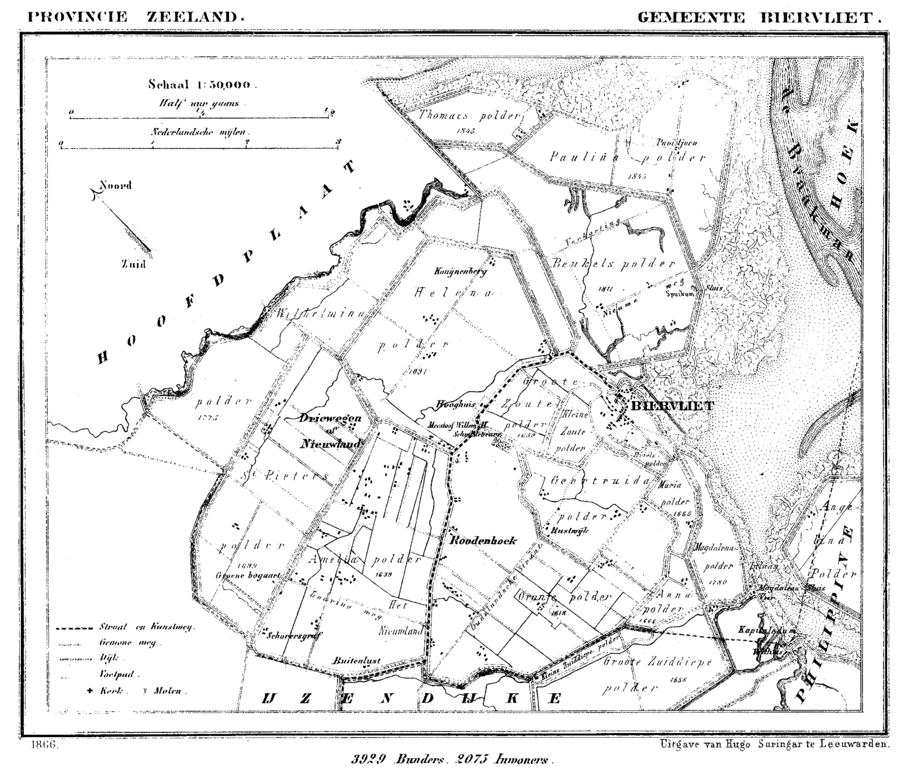 Gemeente Biervliet, Zeeland, Nederland